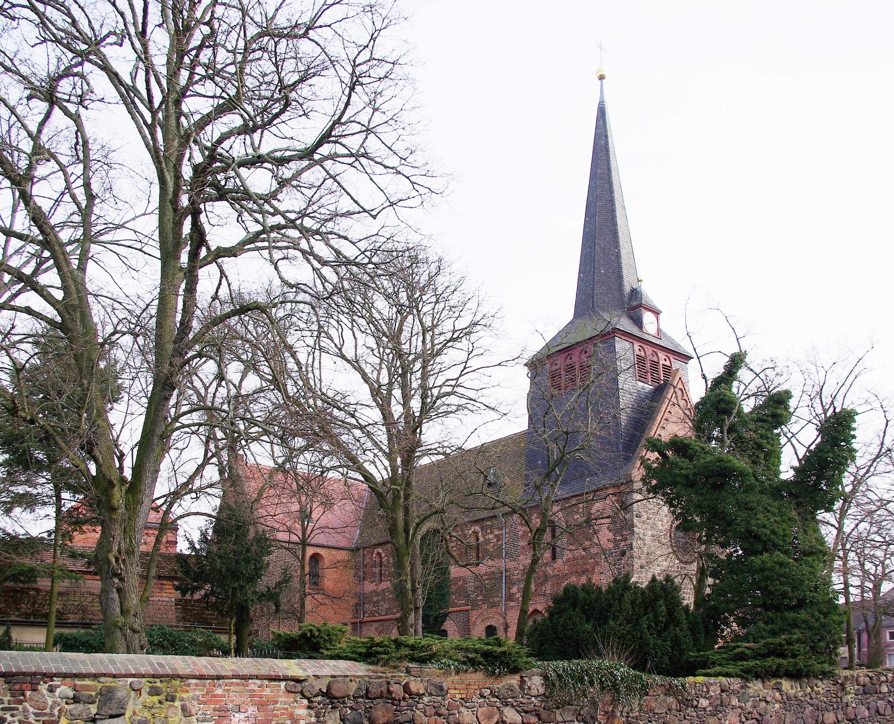 Jüterbog in Brandenburg. Die Liebfrauenkirche liegt im Stadtteil Damm und steht unter Denkmalschutz. Der Fotograf (ich) stand auf der Schloßstraße Ecke Schillerstraße.